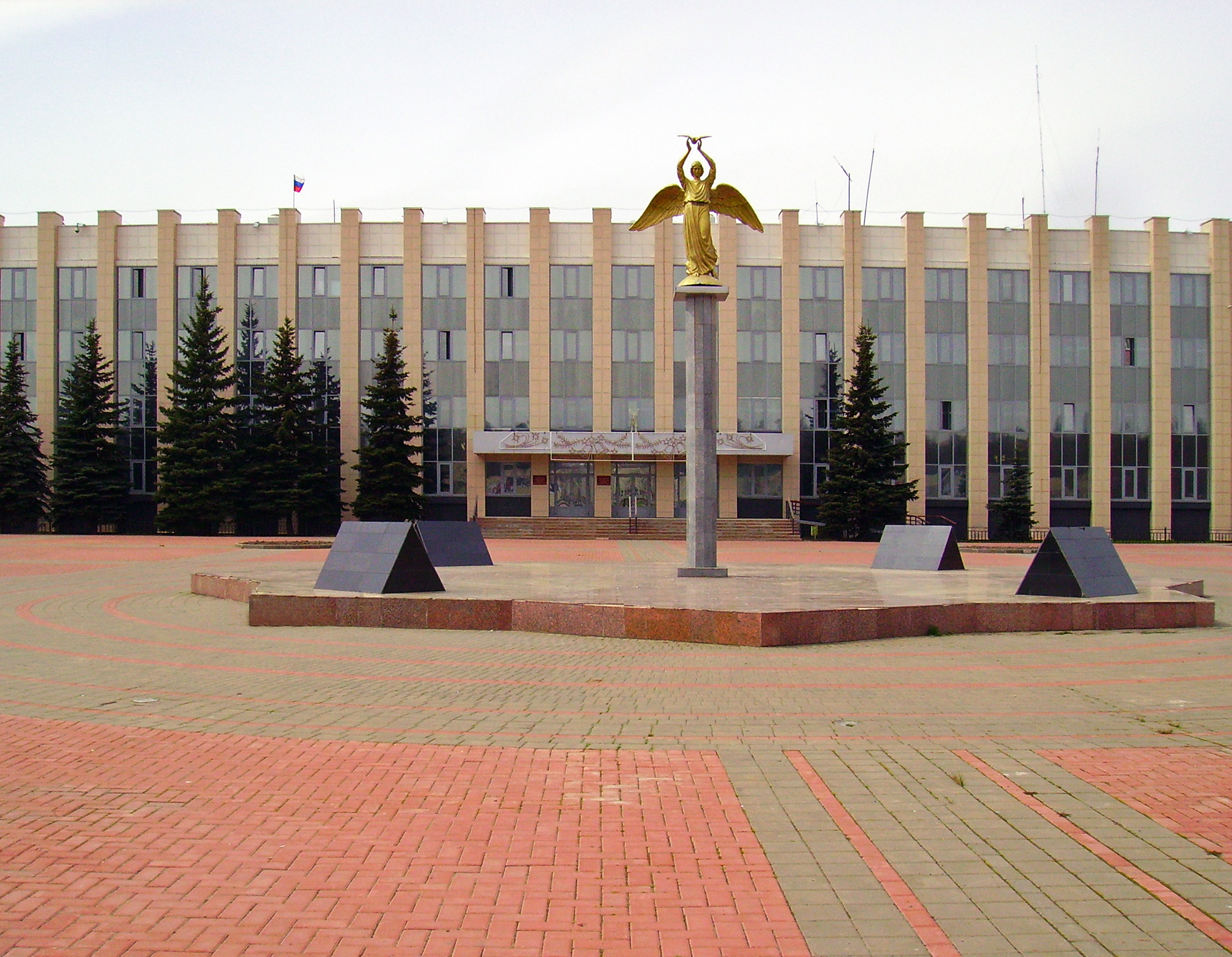 Выкса. Композиция "Золотой ангел" у городской администрации.